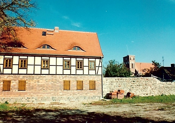 Pasewalk, restauriertes Fachwerkhaus in mittelalterlicher Stadtbefestigung; Nutzung als Kulturhistorisches Museum; rechts im Hintergrund: evangelische Kirche Sankt Marien (nach Einsturz 1984 und Sprengung neu aufgebauter Turm noch ohne Turmhelm); 1993